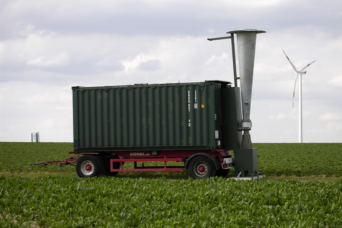 Hagelkanone, sie wird eingesetzt um Hagel in Nassschnee und Regen zu verwandeln.